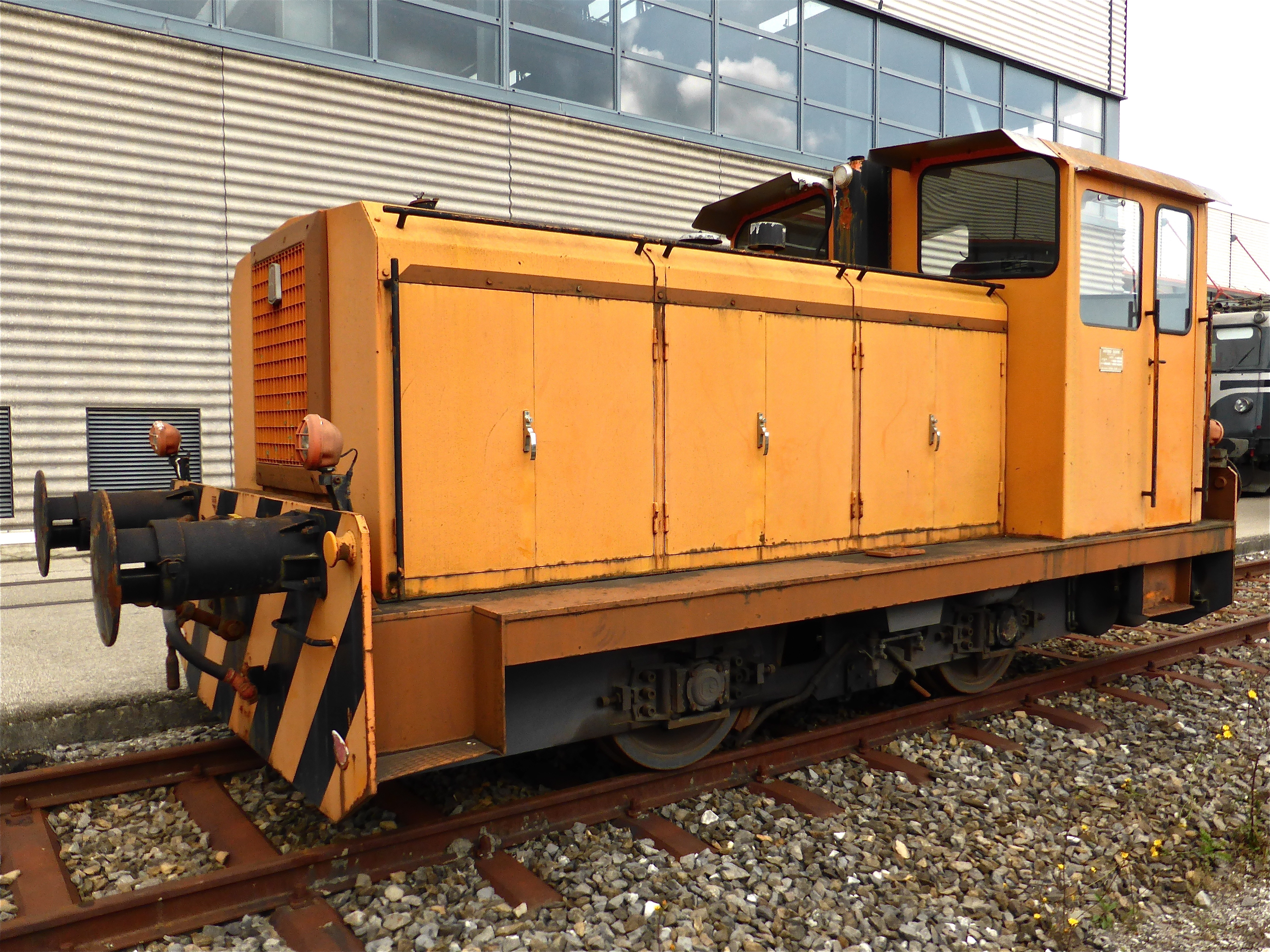 Locomotive de manœuvre Antonio Badoni Lecco, moteur FIAT, année de contruction, 1980